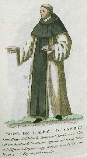 Collection de costumes de tous les ordres monastiques, supprimés à differentes époques, dans la ci-devant Belgique, Bruxelles, Philippe Joseph Maillart et sœur, 1811